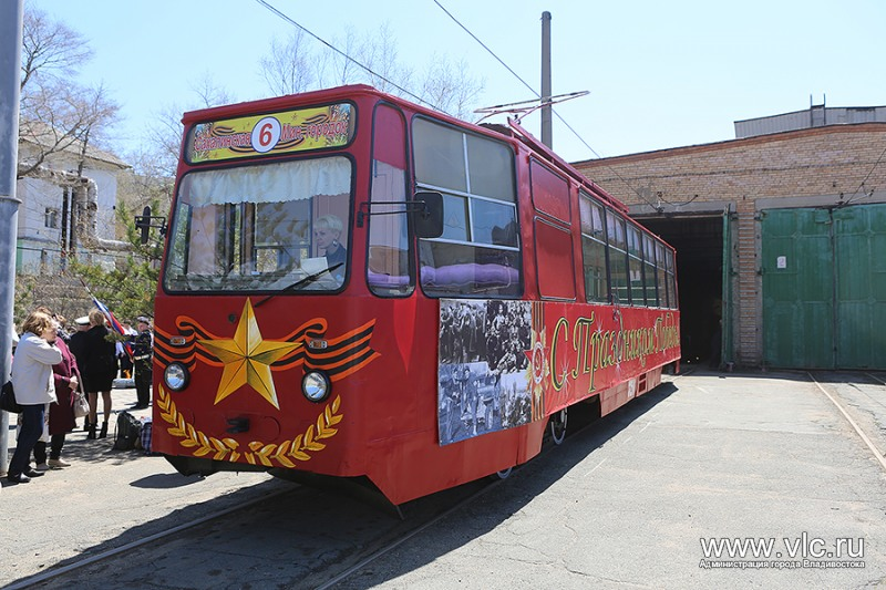 Трамвай ЛМ-93 № 320 во Владивостоке